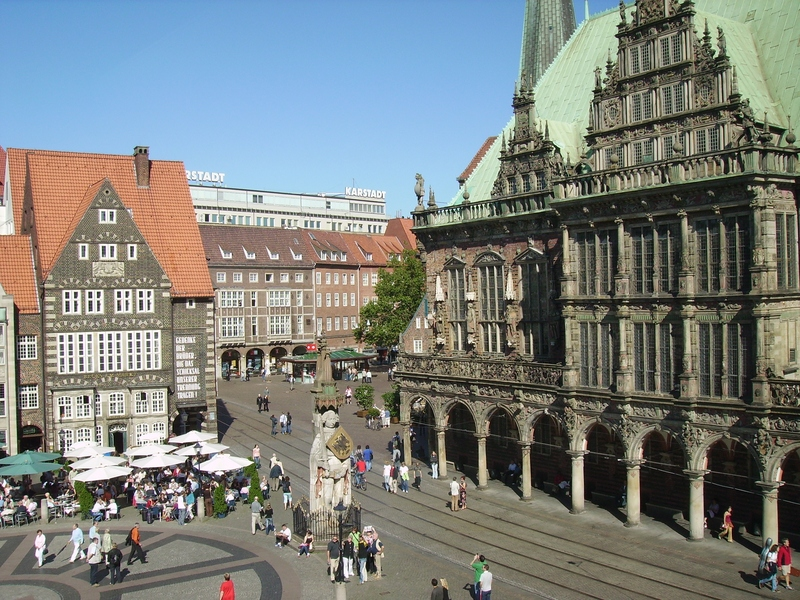 Blick auf den Roland und das Rathaus in Bremen vom Bürgerschaftsgebäude aus